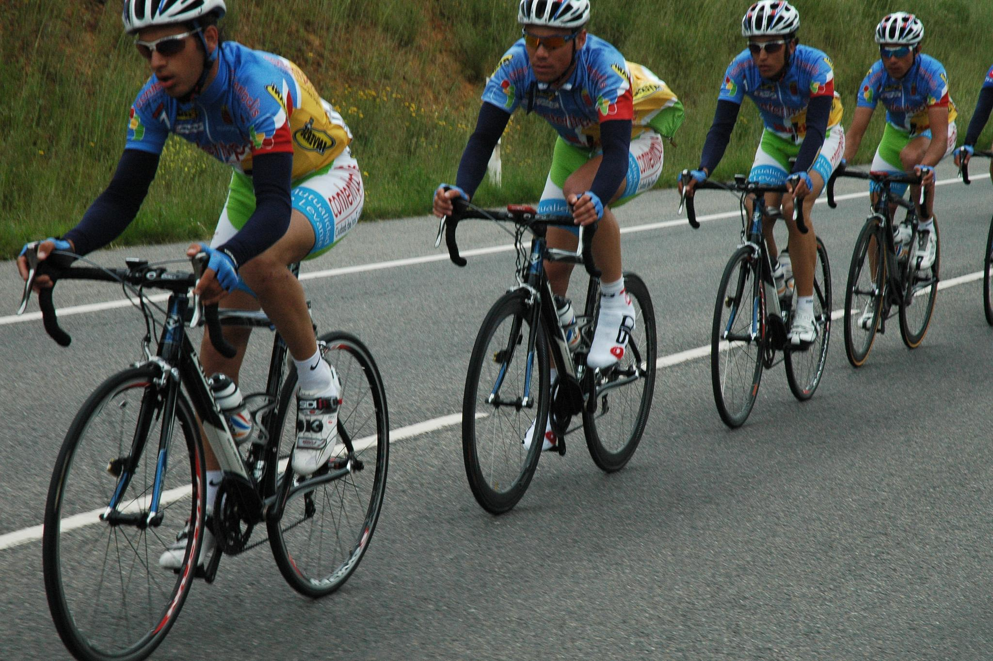 Contentpolis-Murcia, Euskal Bizikleta 2008.